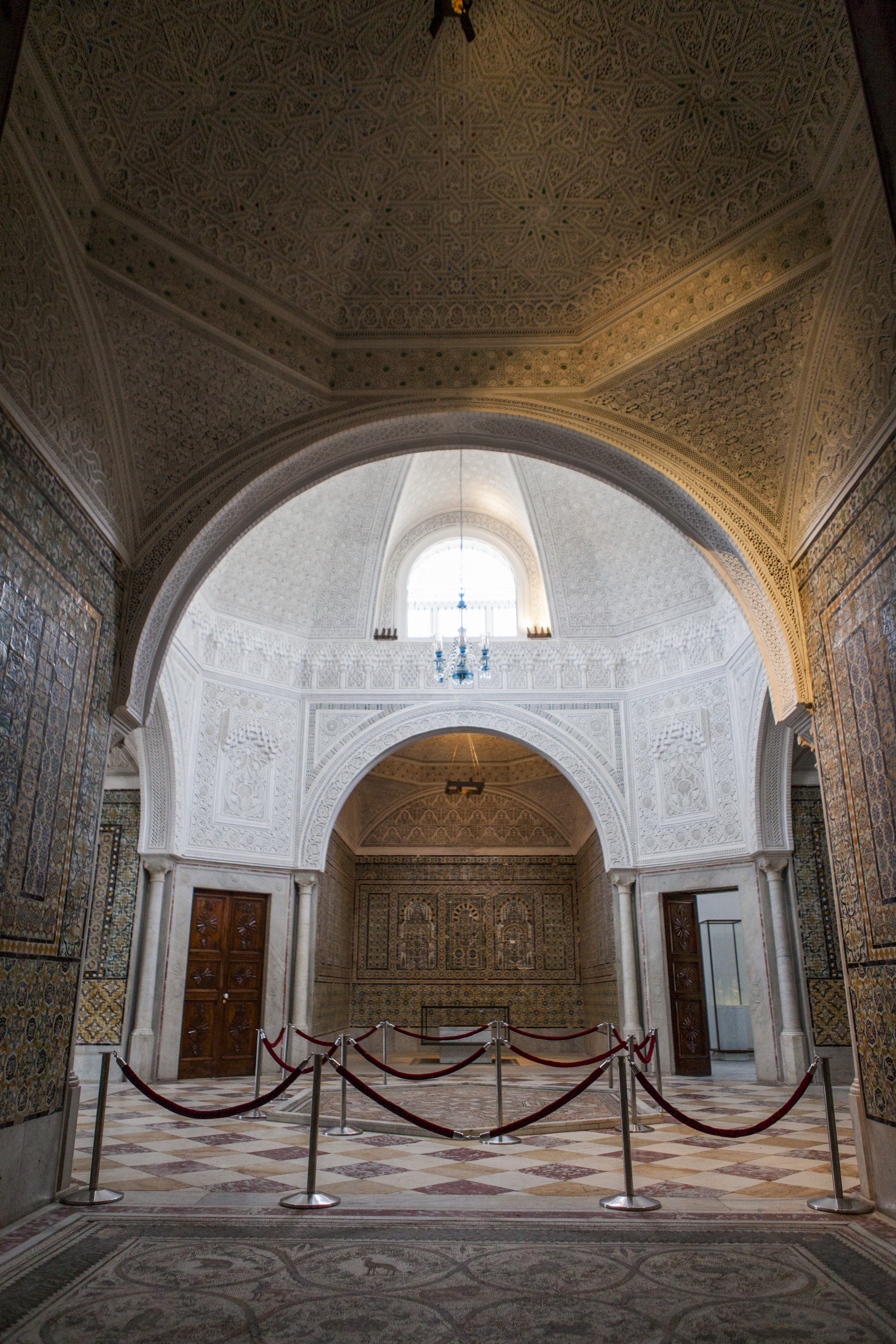 Tunis, musée du Bardo, salle de Virgile